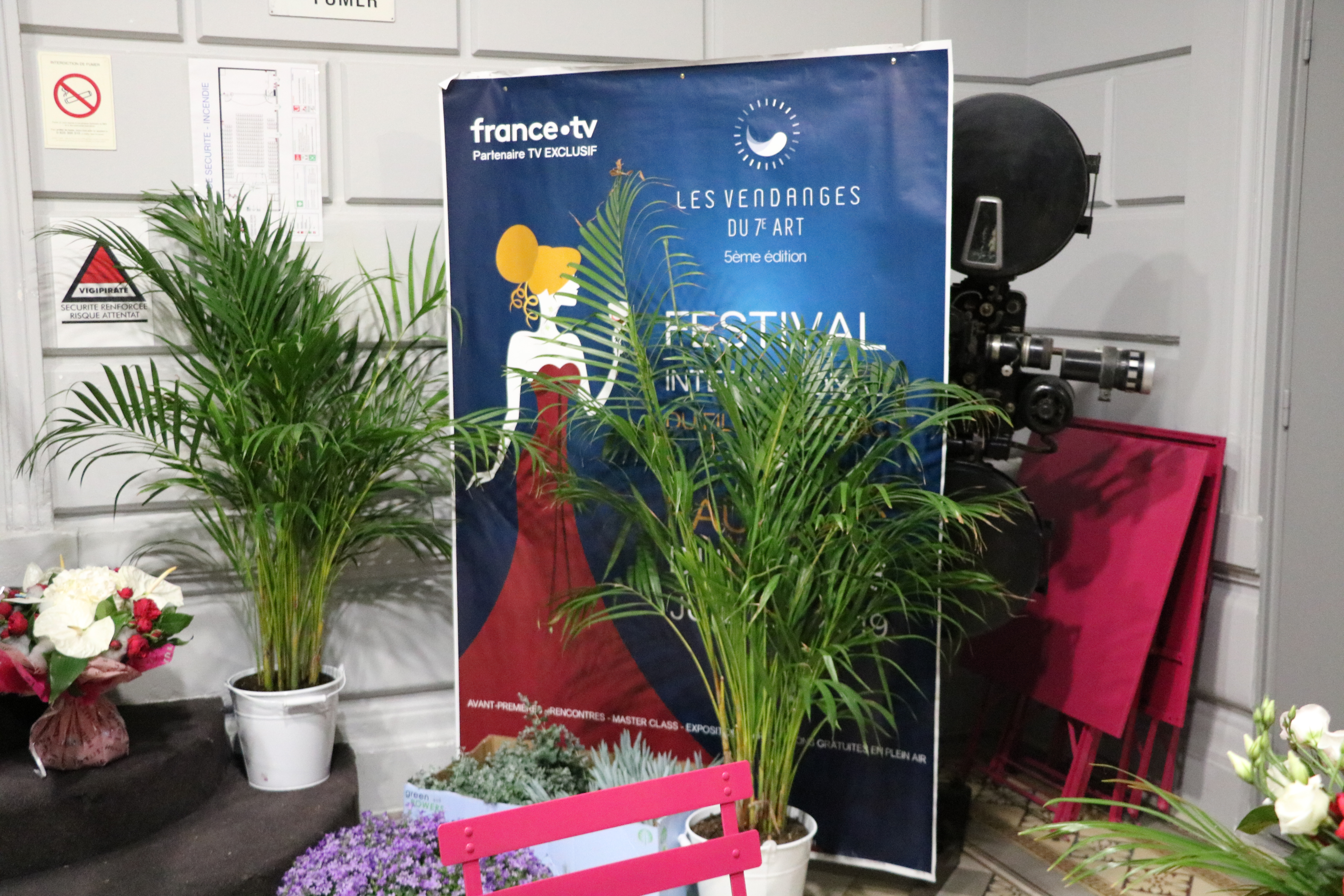 Affiche de la cinquième édition dans le hall du cinéma l'Éden. Une dame en robe de soirée couleur bordeaux illustre le festival.